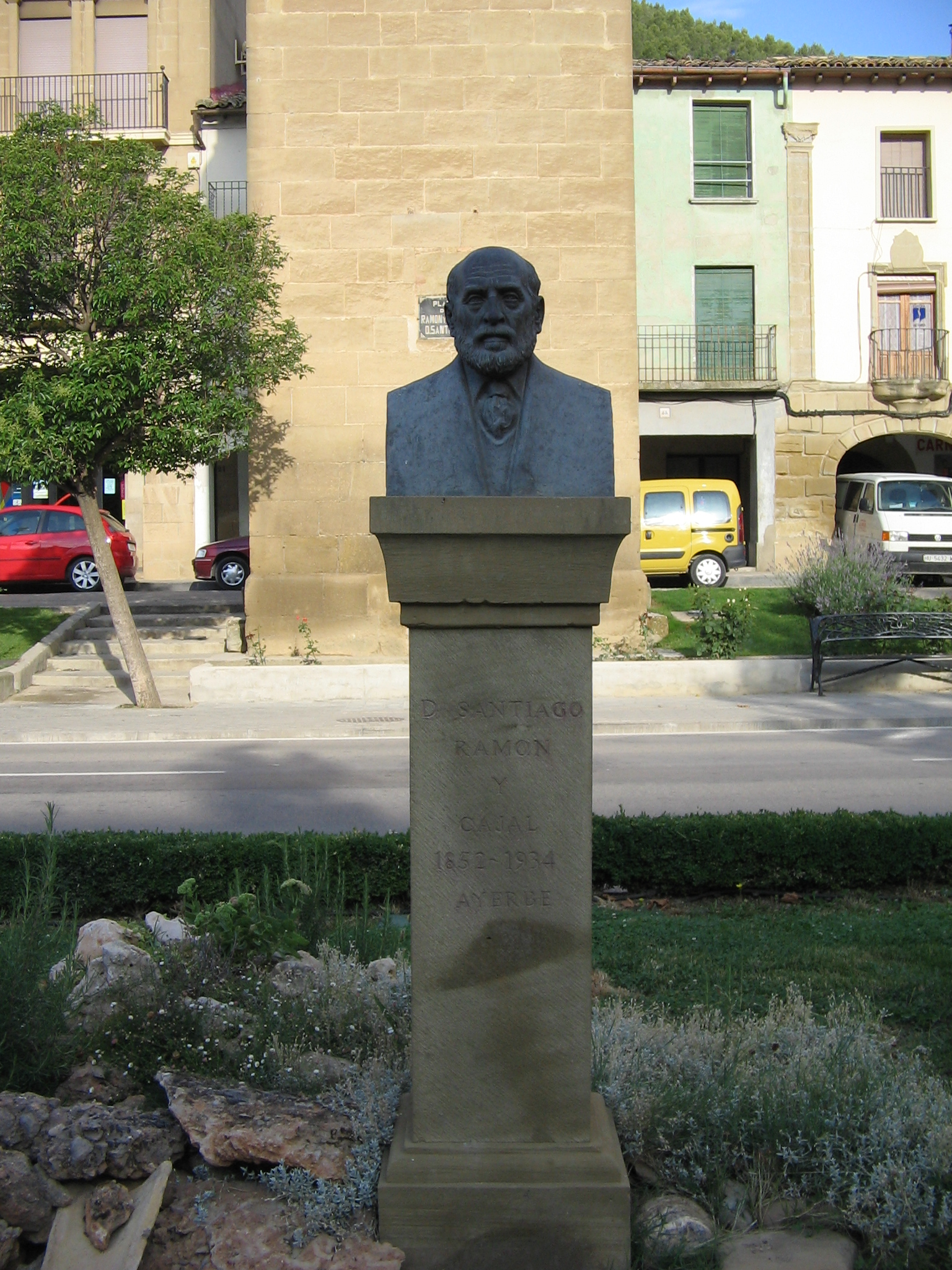 Autor: Pepe Bescós Junio-2006 Es orgullo de los ayerbenses el haber compartido, en otro tiempo, diez años de la vida del premio nobel de las ciencias D. Santiago Ramón y Cajal, promocionando su recuerdo con este busto en la plaza que lleva su nombre